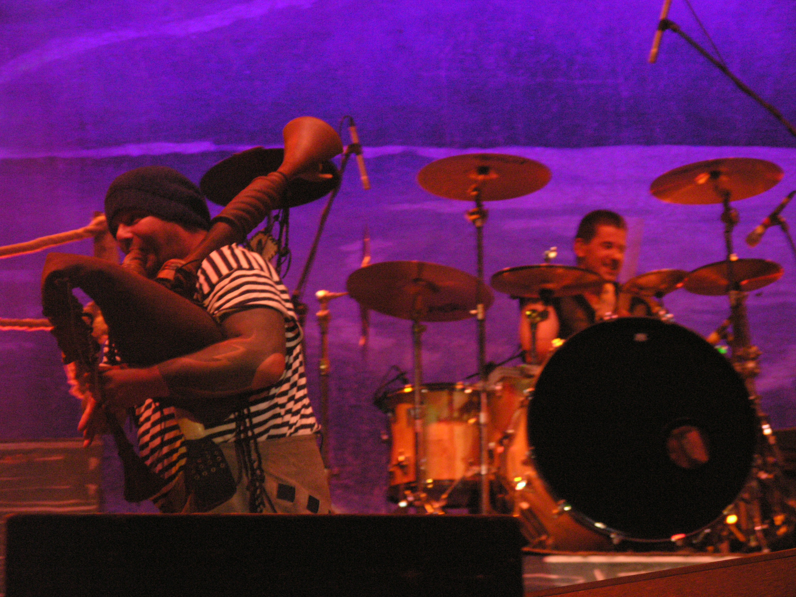 Zespół In Extremo w czasie festiwalu Masters of Rock 2007